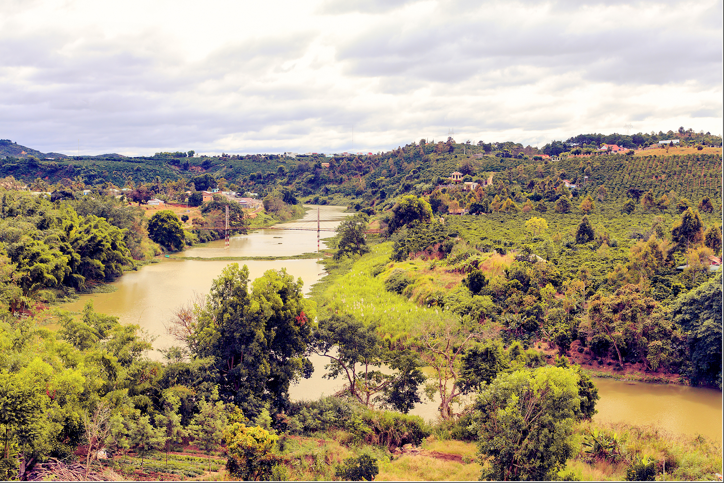 Một cảnh ở xã Phú Hội, huyện Đức Trọng, Lâm Đồng, Việt Nam.